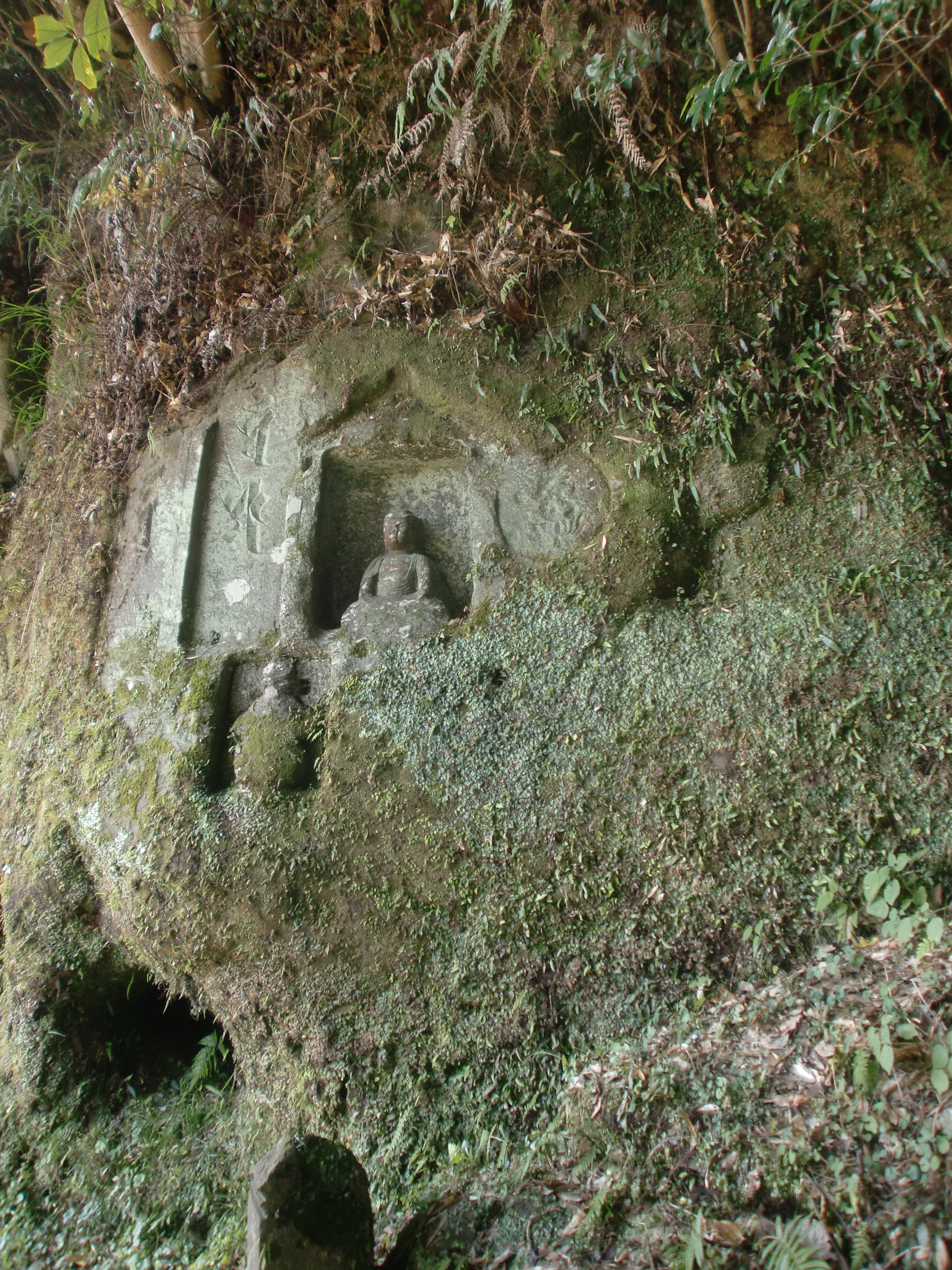 薩摩川内市樋脇町倉野にある倉野磨崖仏。全国で唯一仏種子梵字が現存している。